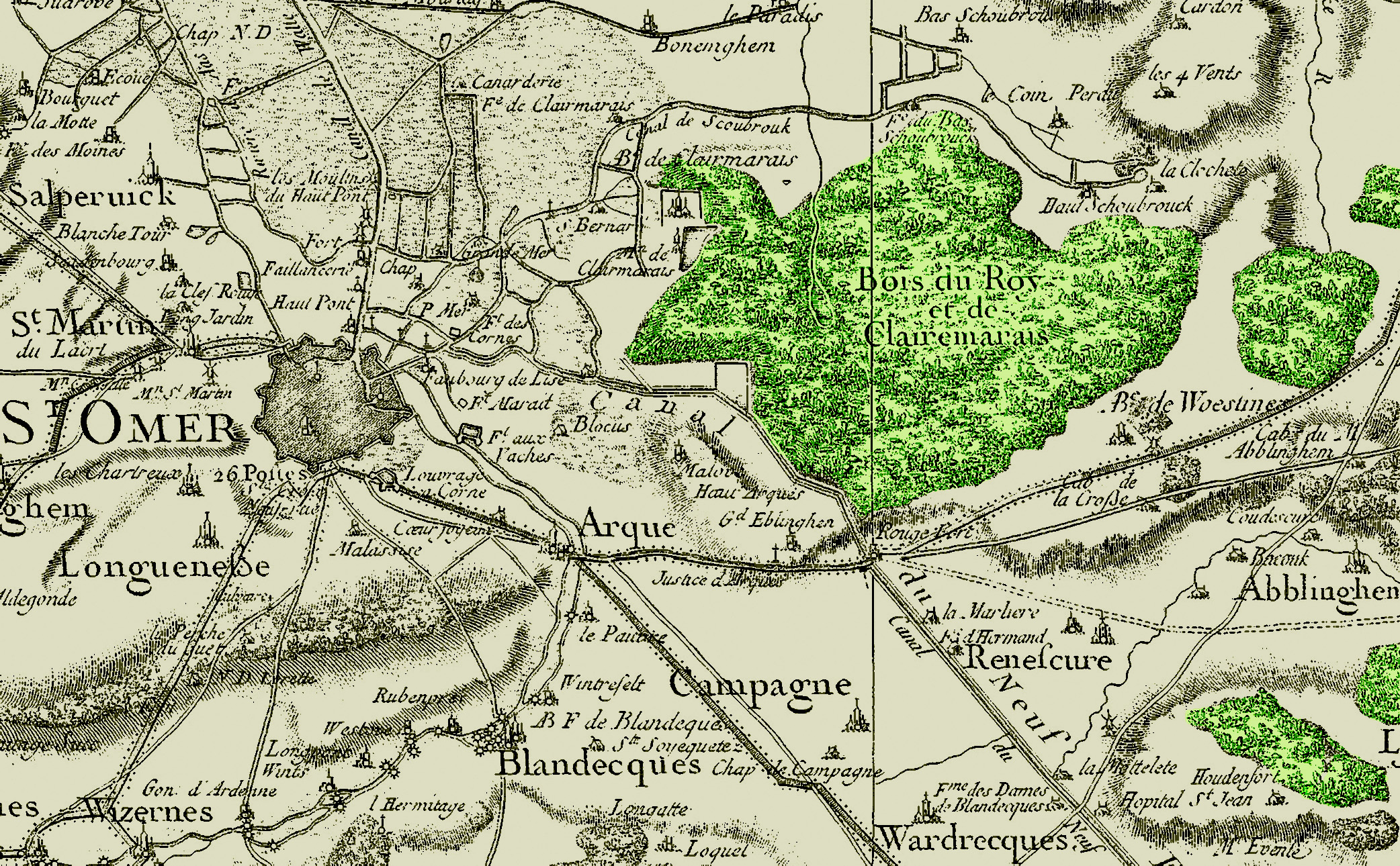 fr Carte ancienne datant de la révolution française, dressée par la famille Cassini (3 générations de cartographes). En vert : La forêt (ancienne forêt royale) de Rihoult Clairmarais et les boisements les plus proches.